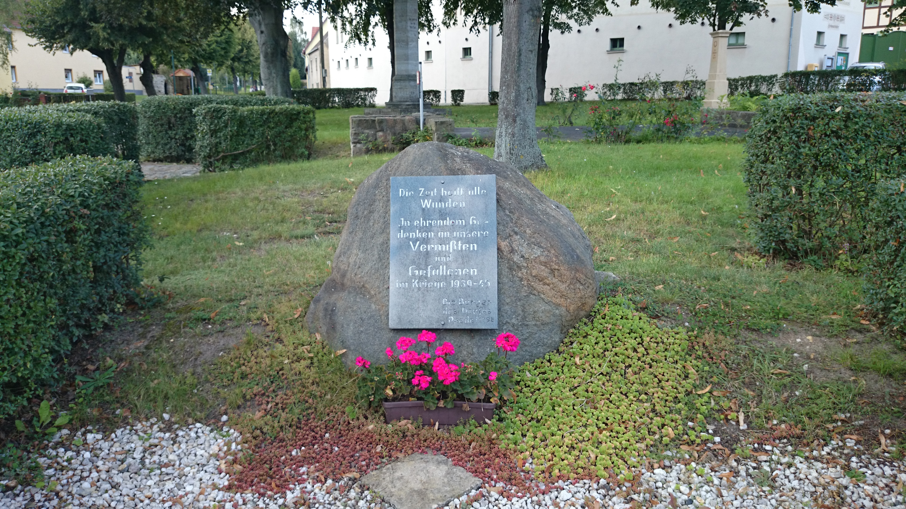 Gedenktafel für die Opfer des 2.Weltkrieges in Predel